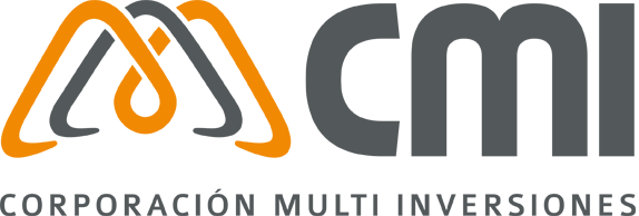 Logotipo Corporación Multi Inversiones